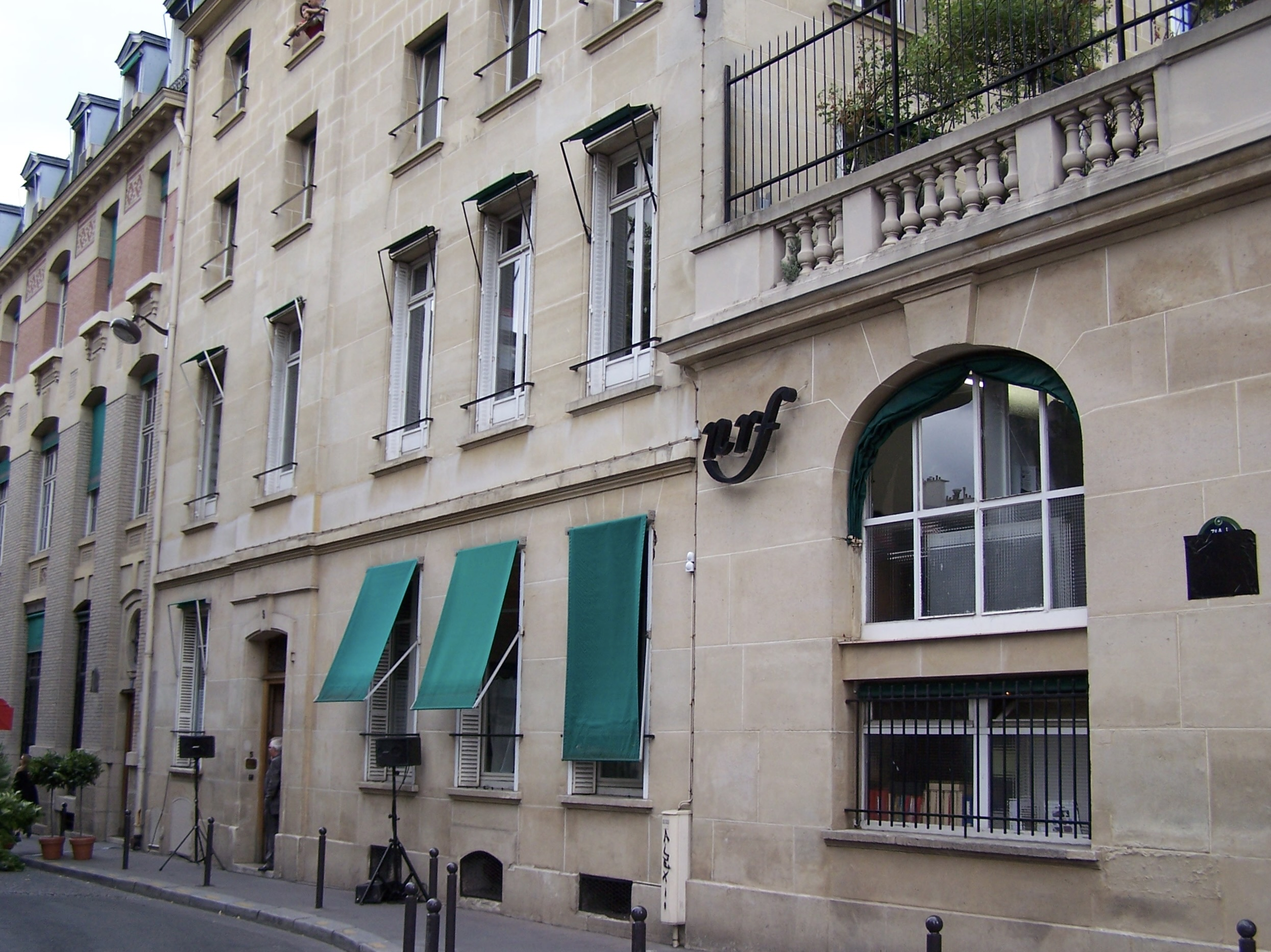 Siège de la NRF, éditions Gallimard, le jour de l'inauguration de la rue Gaston-Gallimard